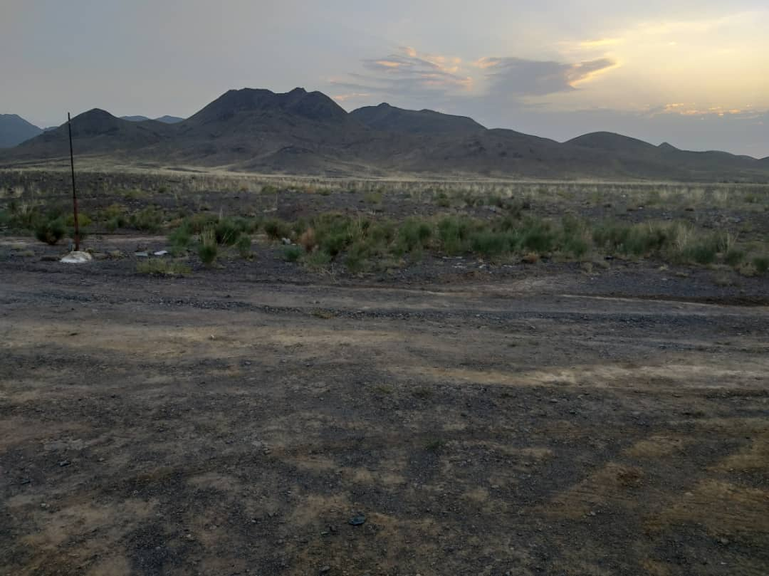 کوههای غربی روستای آشنو واقع در شهرستان نائین